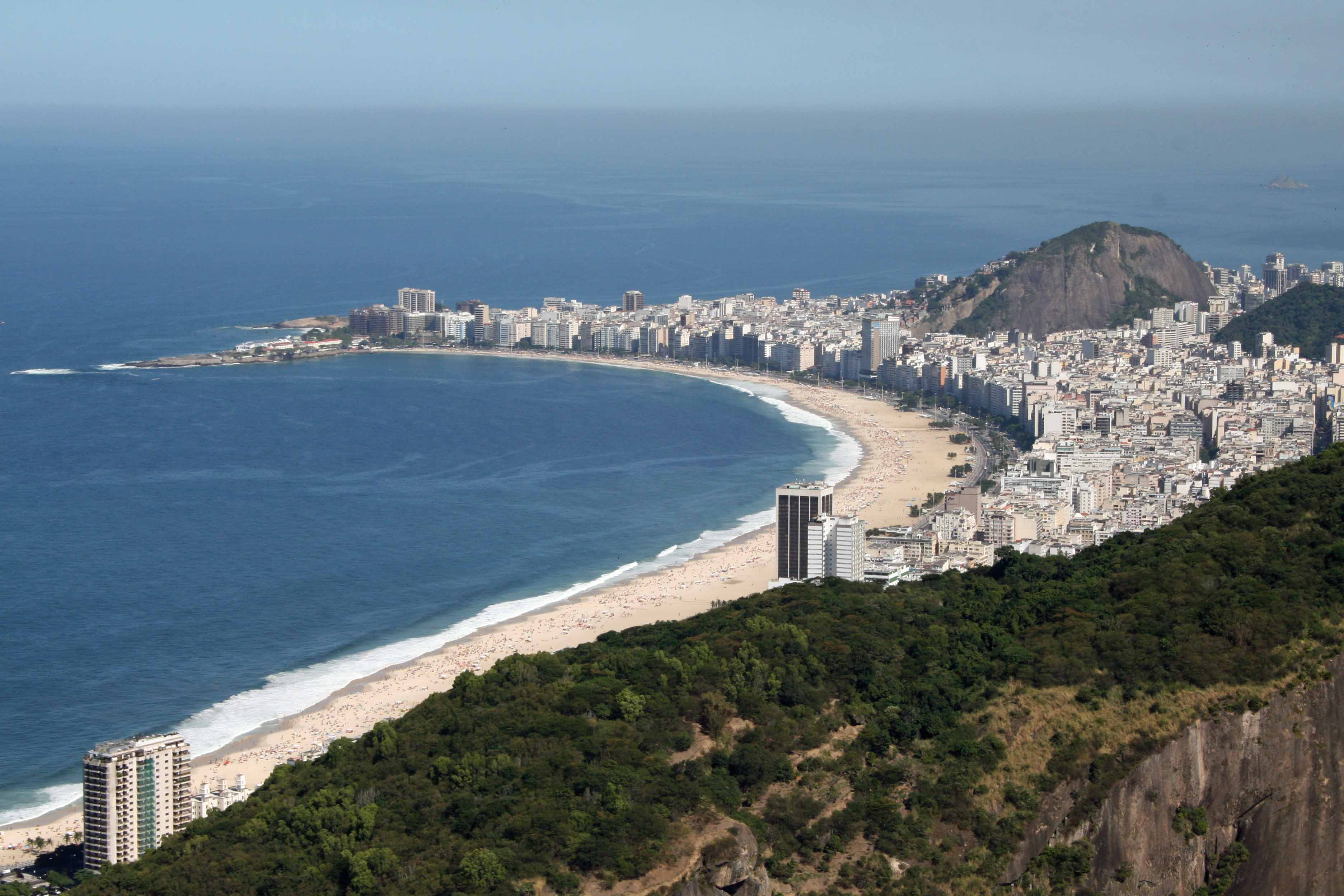 Morro da Babilônia, Praias do Leme e de Copacabana vistos do Pão de Açúcar.